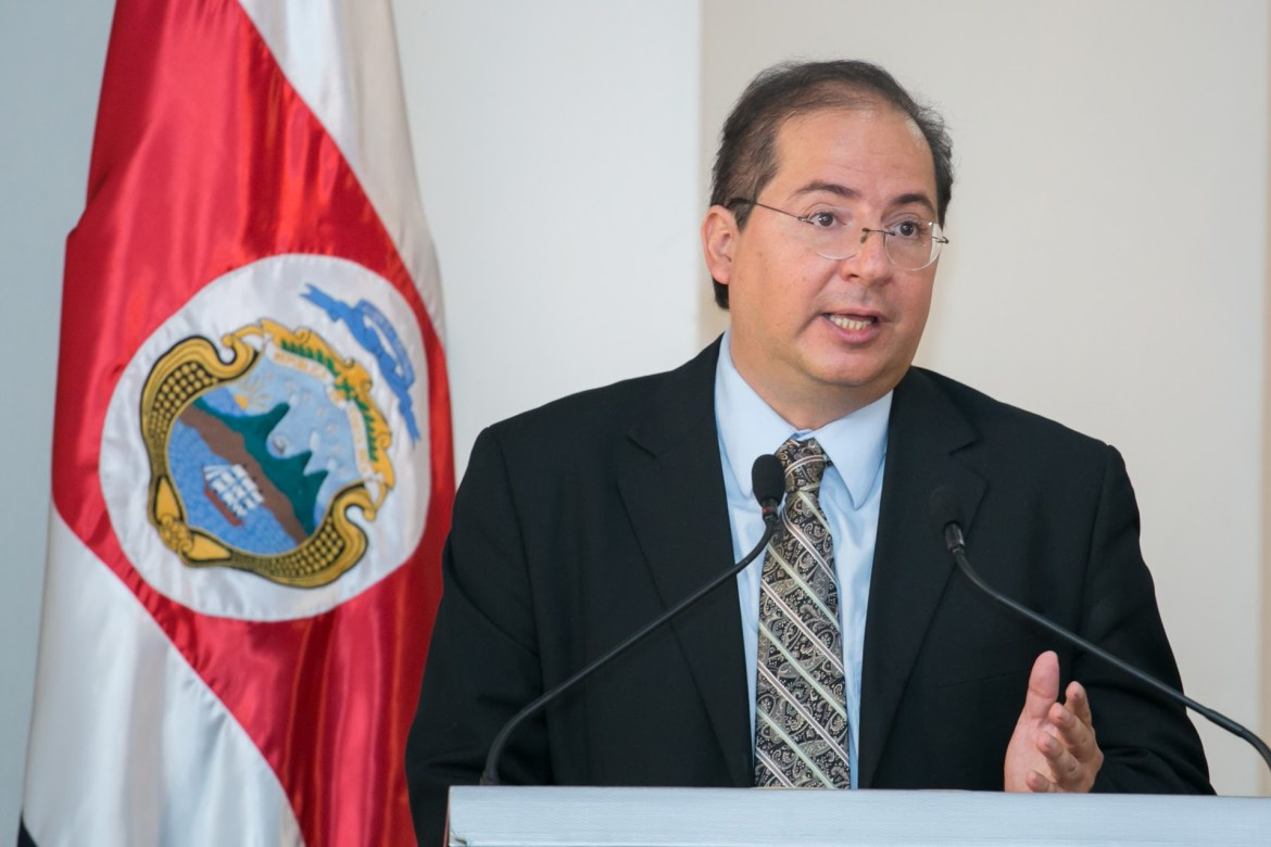 Foto de Mauricio Herrera Ulloa aceptando el cargo de Ministro de Comunicación